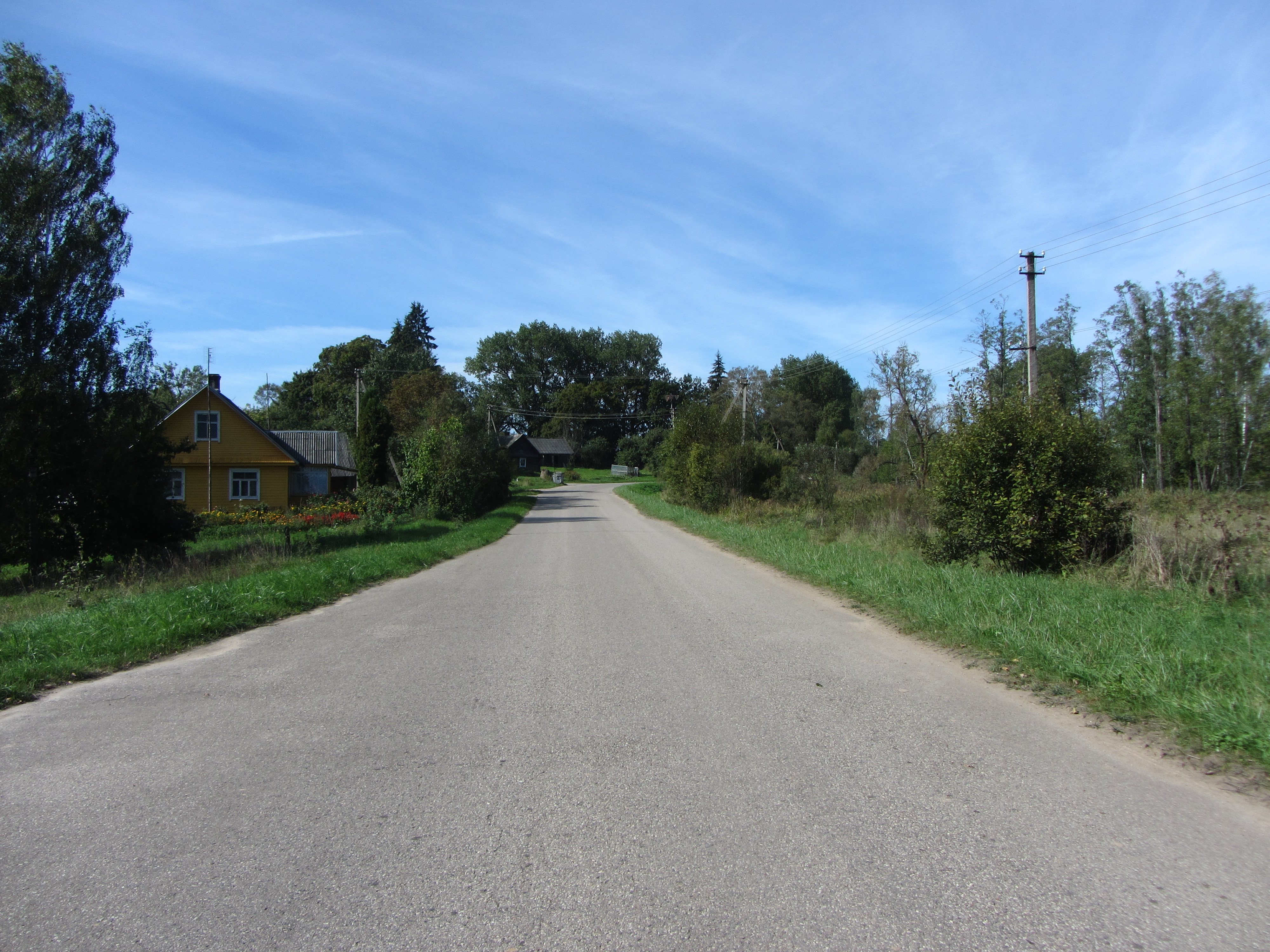 Kazimieravas, Lithuania